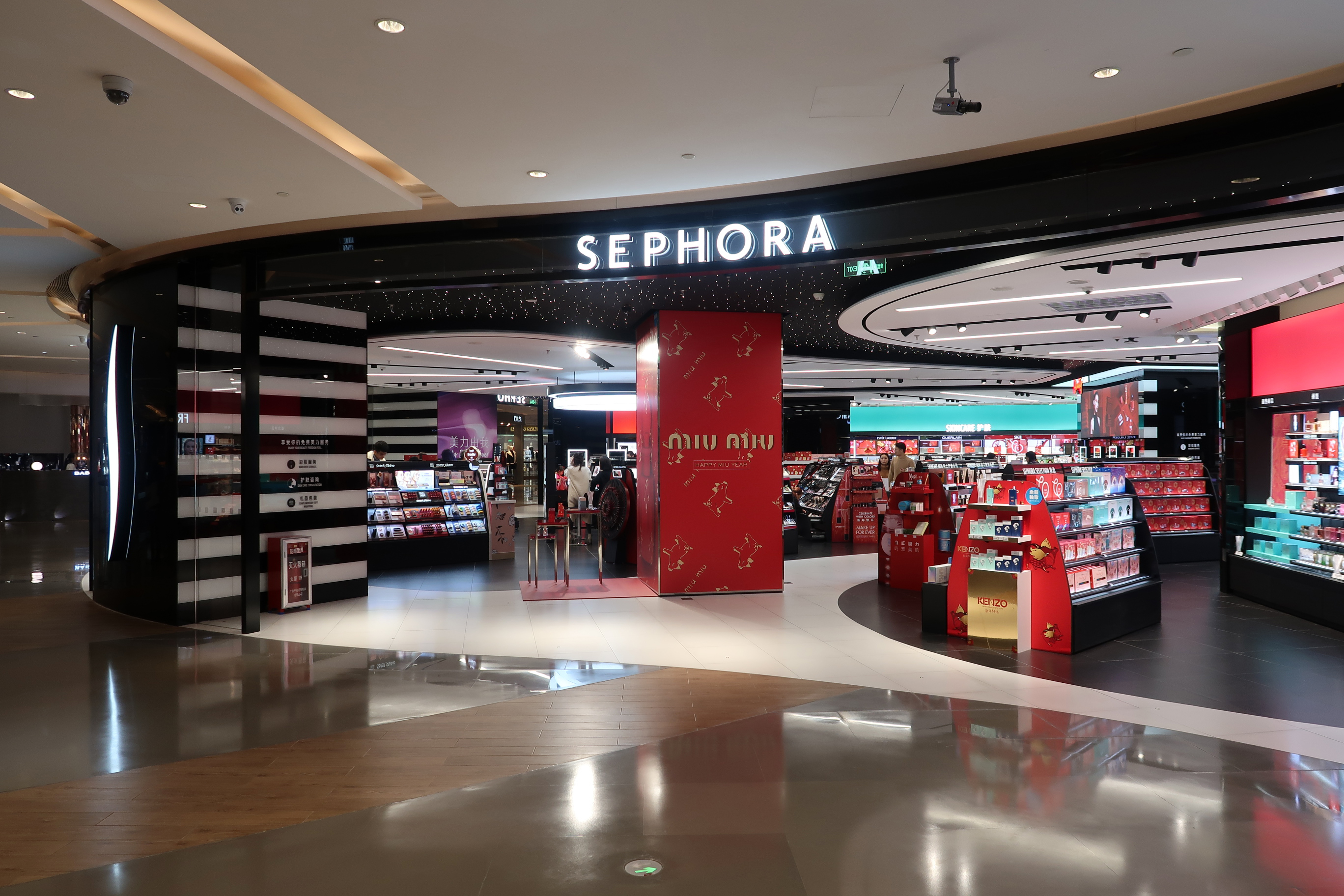 SEPHORA in K11 Guangzhou